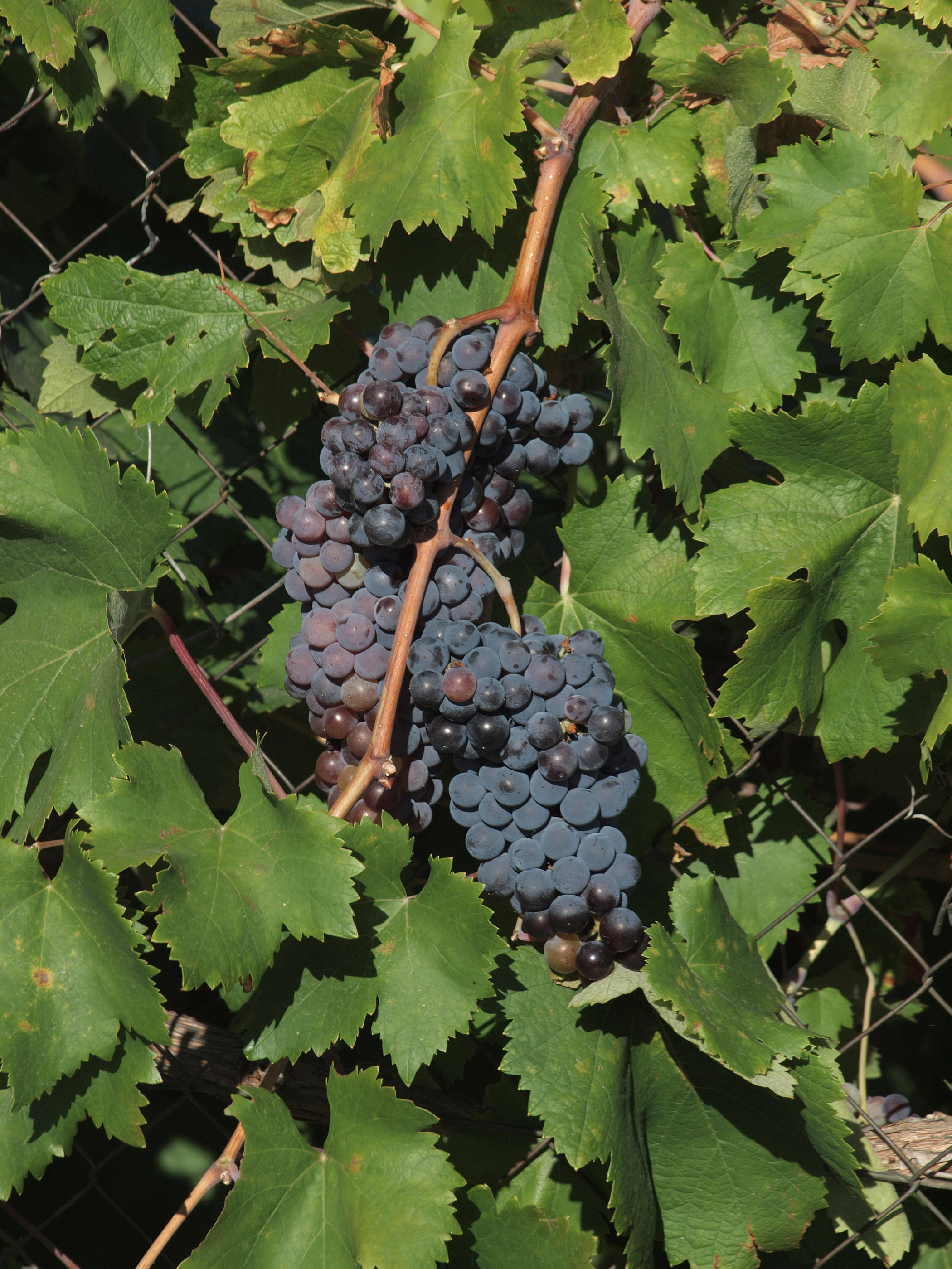 Vitis vinifera. Losar de la Vera (Cáceres, España).